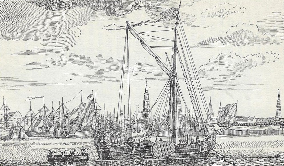 Yacht der Hamburgischen Admiralität